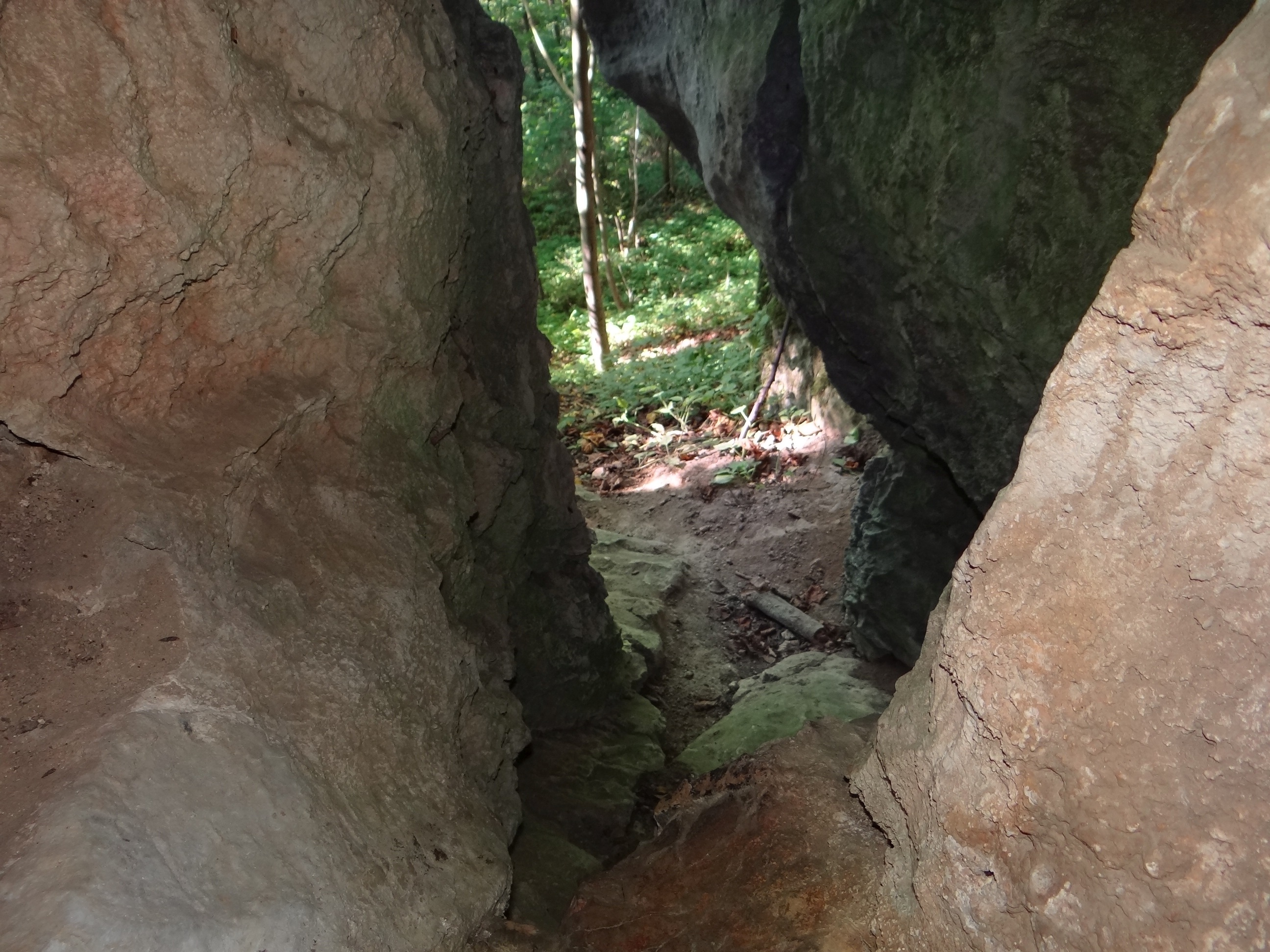 Jaskinia Mała na Wrzosach